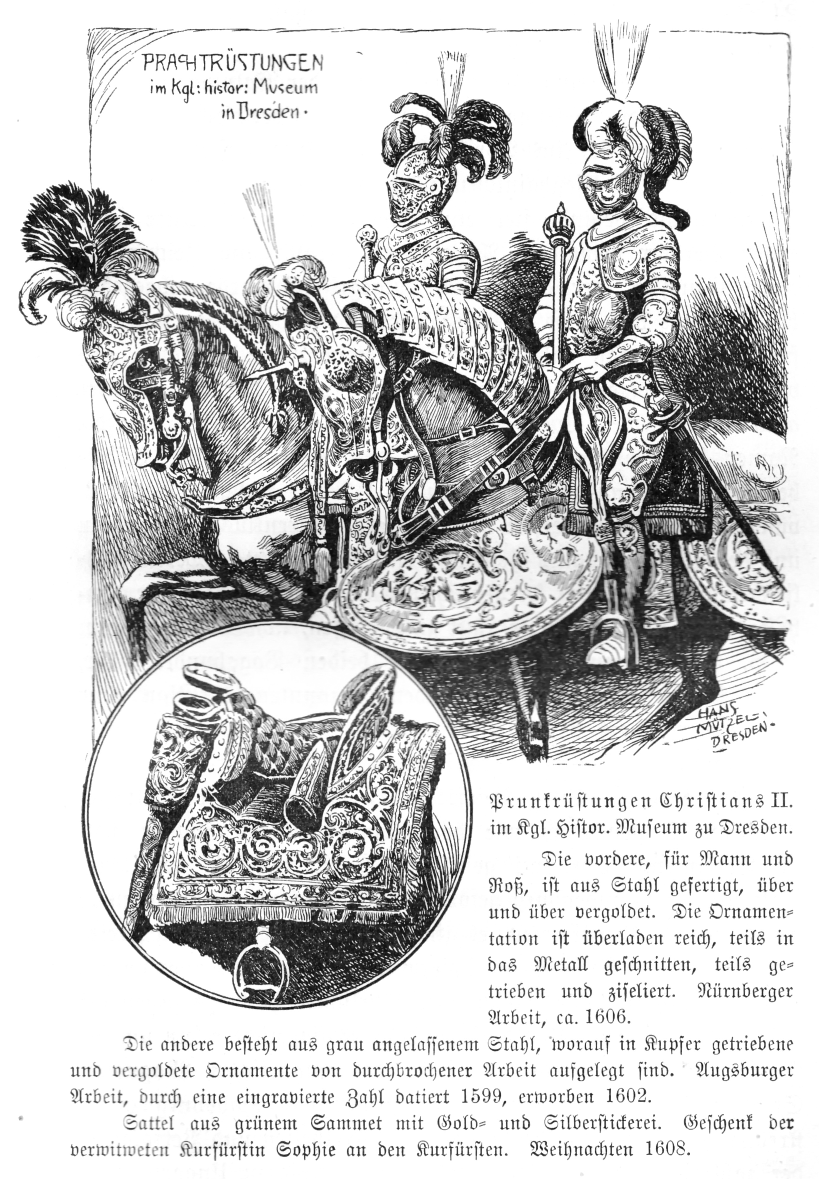 Prunkrüstungen Christians II. im Kgl. Museum zu Dresden. Die vordere, für Mann und Roß, ist aus Stahl gefertigt, über und über vergoldet. Die Ornamentation ist überladen reich, teils in das Metall geschnitten, teils getrieben und ziseliert. Nürnberger Arbeit, ca. 1606. Die andere besteht aus grau angelassenem Stahl, worauf in Kupfer getriebene und vergoldete Ornamente von durchbrochener Arbeit aufgelegt sind. Augsburger Arbeit, durch eine eingravierte Zahl datiert 15,99, erworben 1602. Sattel aus grünem Sammet mit Gold- und Silberstickerei. Geschenk der verwittweten Kurfürstin Sophie an den Kurfürsten. Weihnachten 1608.